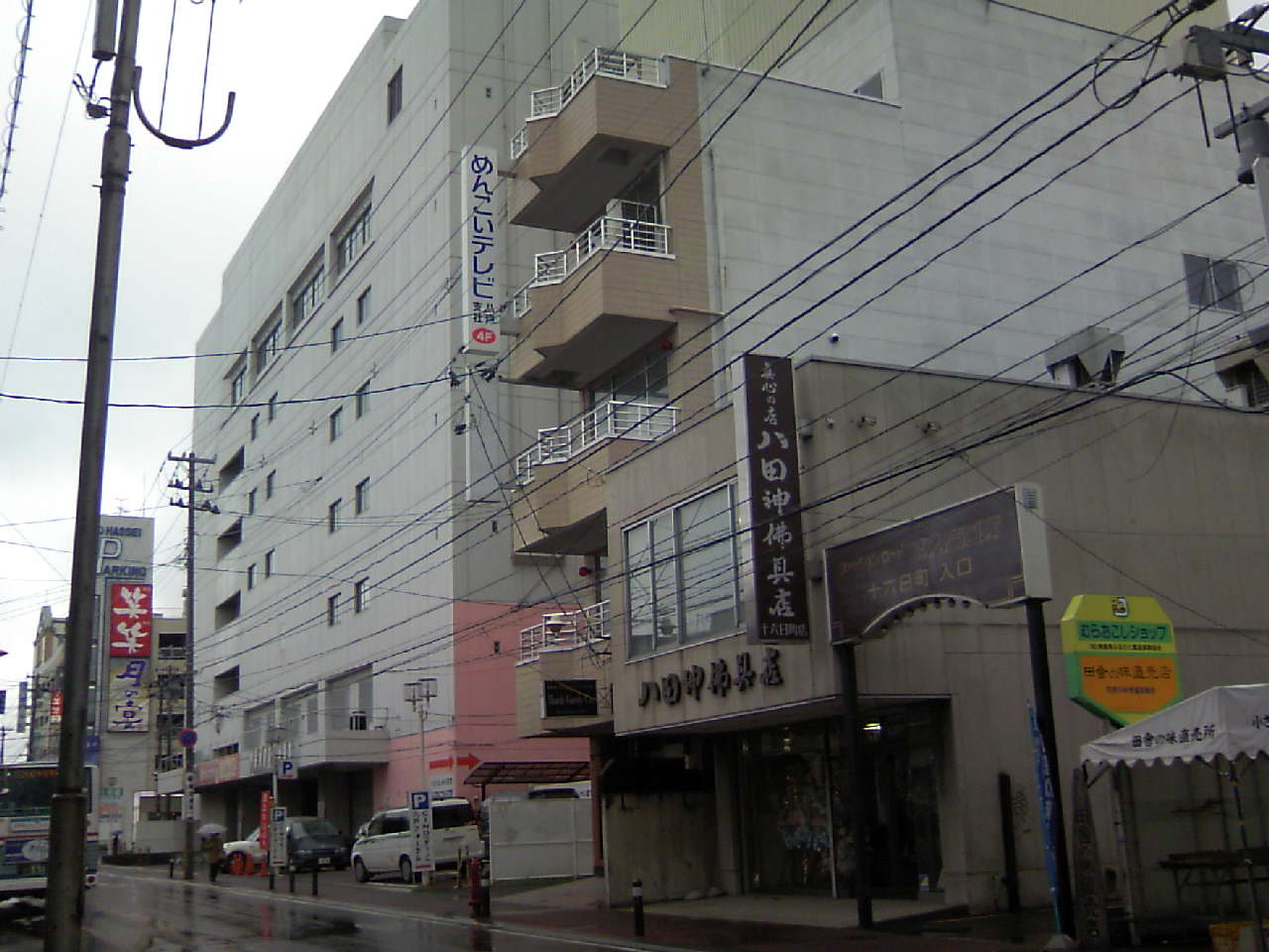 タケダスポーツ十六日町ビル（青森県八戸市） (Takeda Sports Jyuurokunichimachi Building - Hachinohe, Aomori, JAPAN)